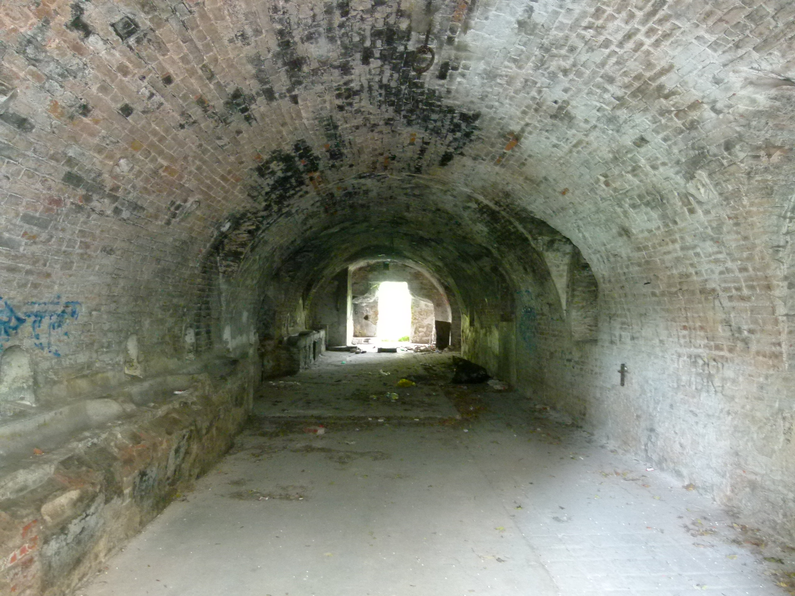 Pevnost Flošna Pivovarská (Hradec Králové), Pivovarská flošna 500/1, Hradec Králové